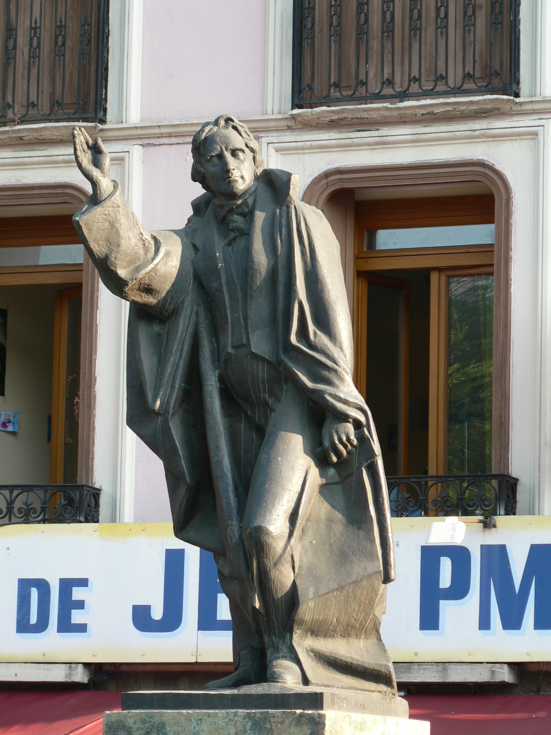 Statue d'Arago à Estagel (par Marcel Homs ? à vérifier !)